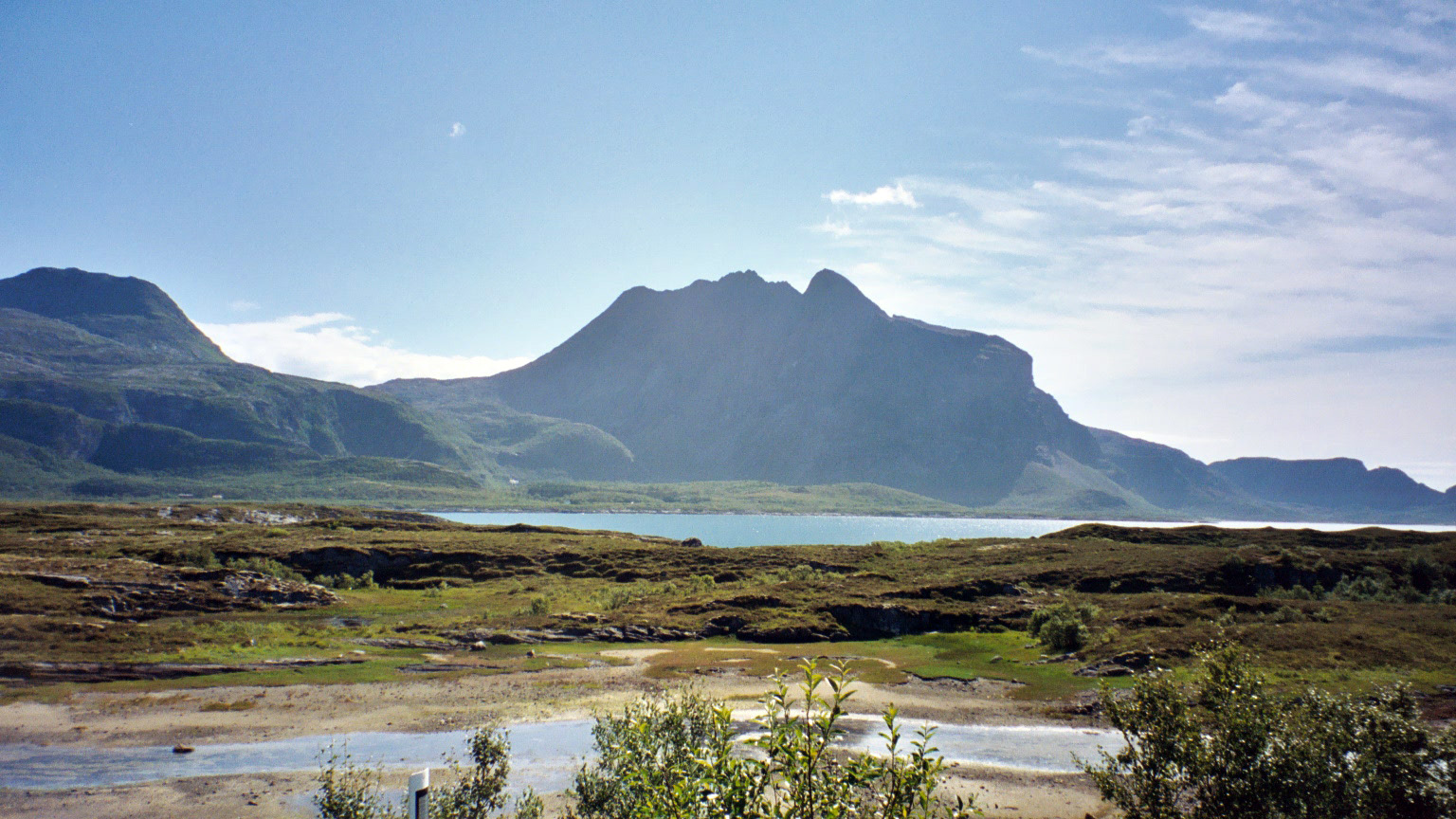 Dønnamannen slik du ser den i all sin prakt. Dønnamannen finner du på øya Dønna i Nordland fylke, Norge.